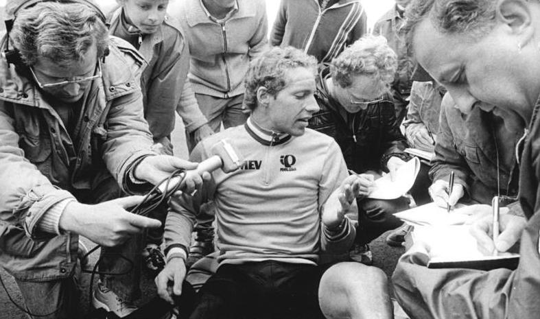 Johannes Draaijer ADN-ZB Kasper 13.5.87 CSSR: 40. Internationale Friedensfahrt-5. Etappe von Gera nach Most über 168 km-Umringt von Presse, Rundfunk und Fernsehen, der 25jährige Etappensieger Johannes Draaijer (Niederlande) kurz nach der Zielankunft.